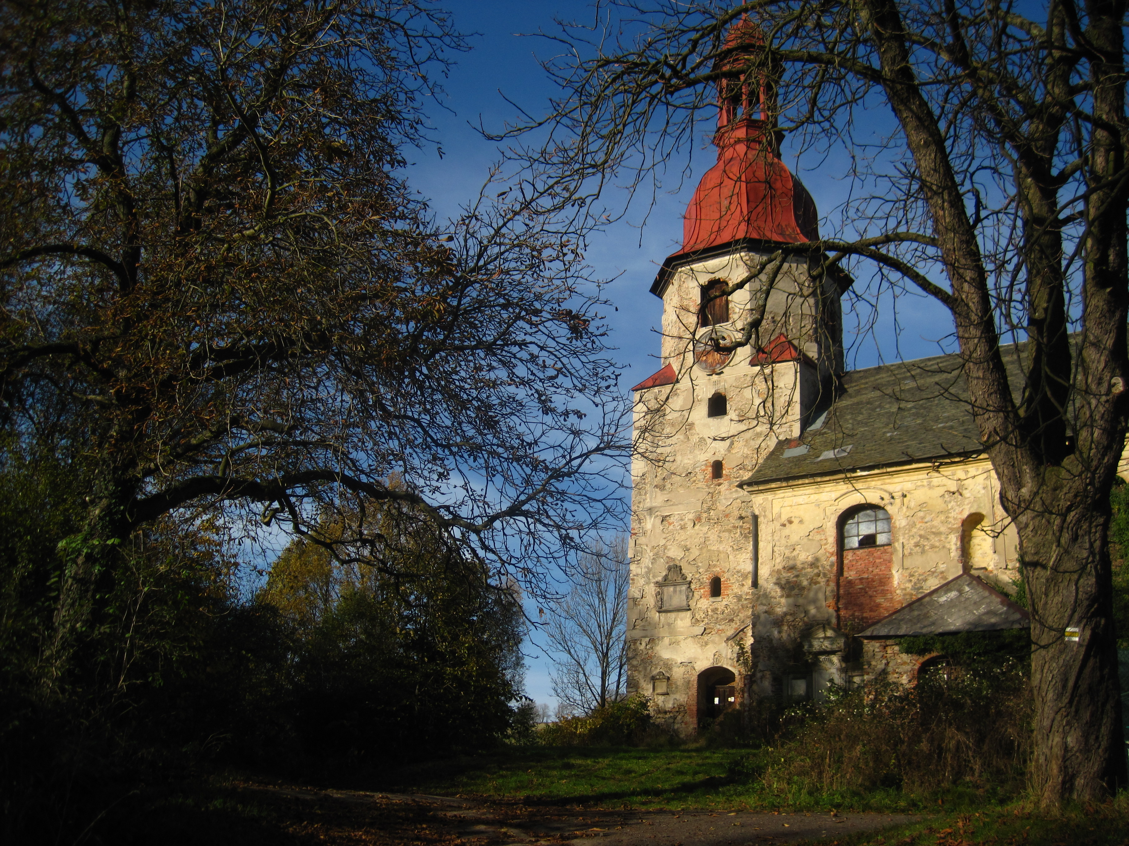 Kostel Navštívení Panny Marie, Horní Vítkov.